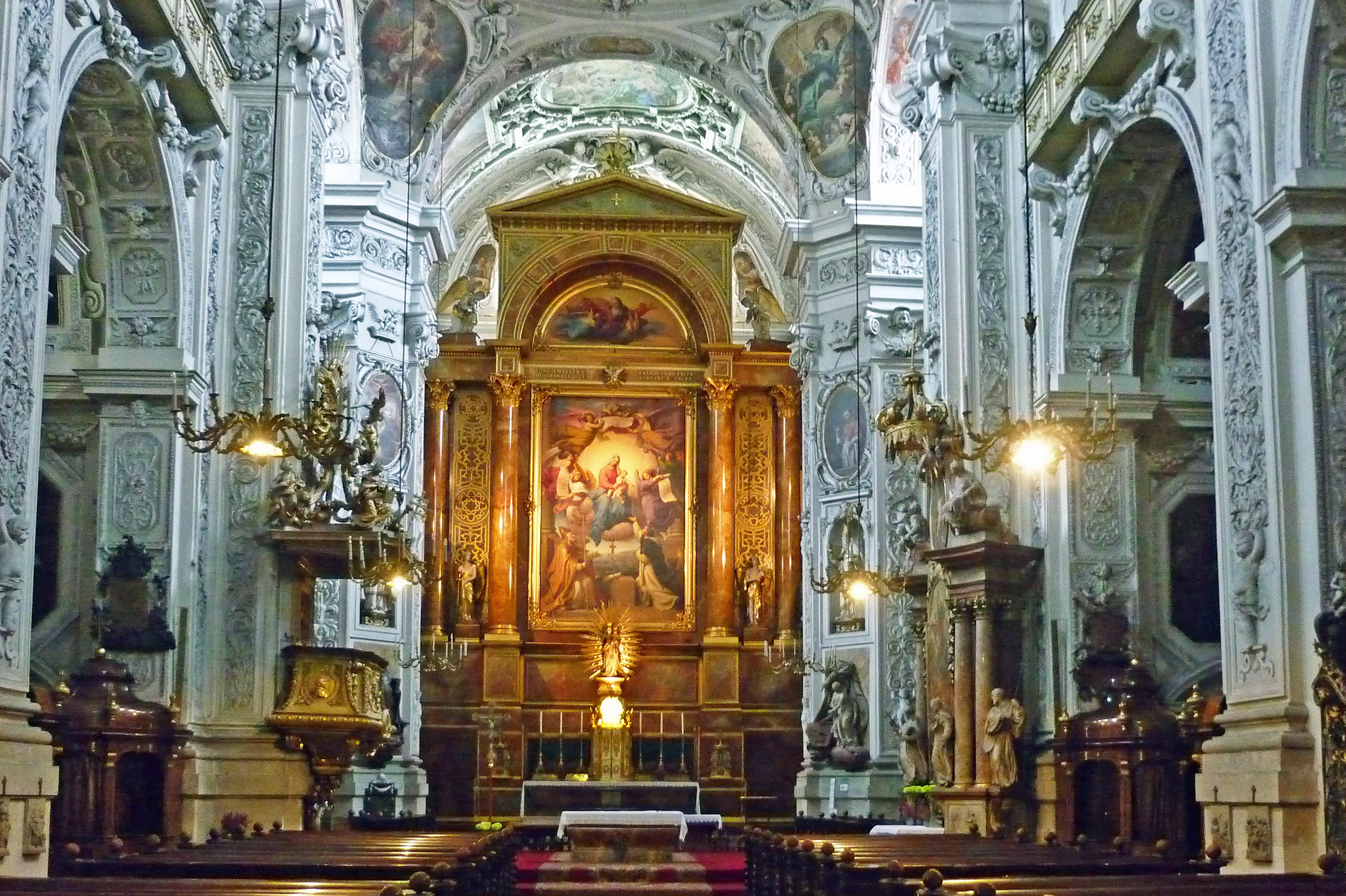 Dominikanerkirche Wien, Dominikanerbastei - Predigergasse